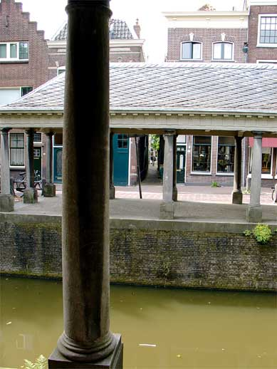 Foto gemaakt 11 augustus 2005.